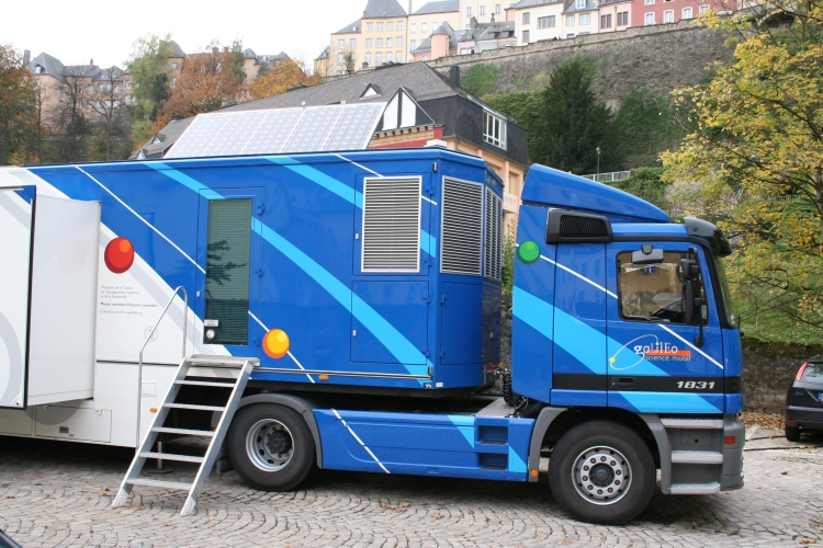 Zuchmaschinn vum Galileo Science Mobil (Oktober 2005).